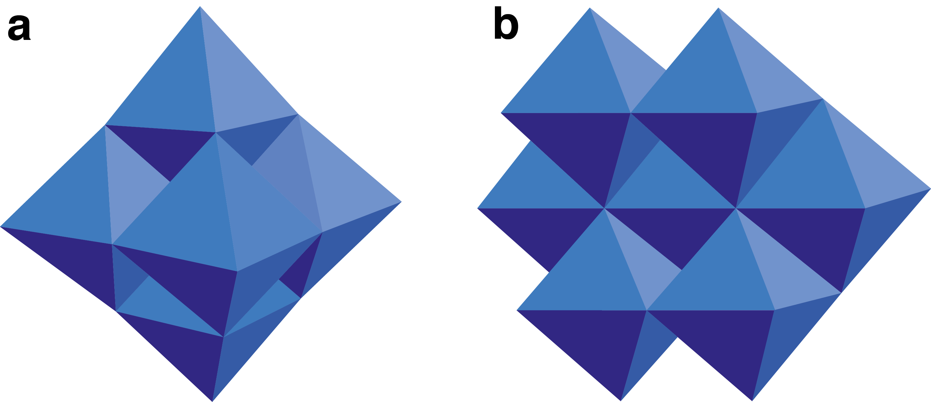 Die Polyederstrukturen des [Mo6O19]2- (a) und [Mo7O24]6